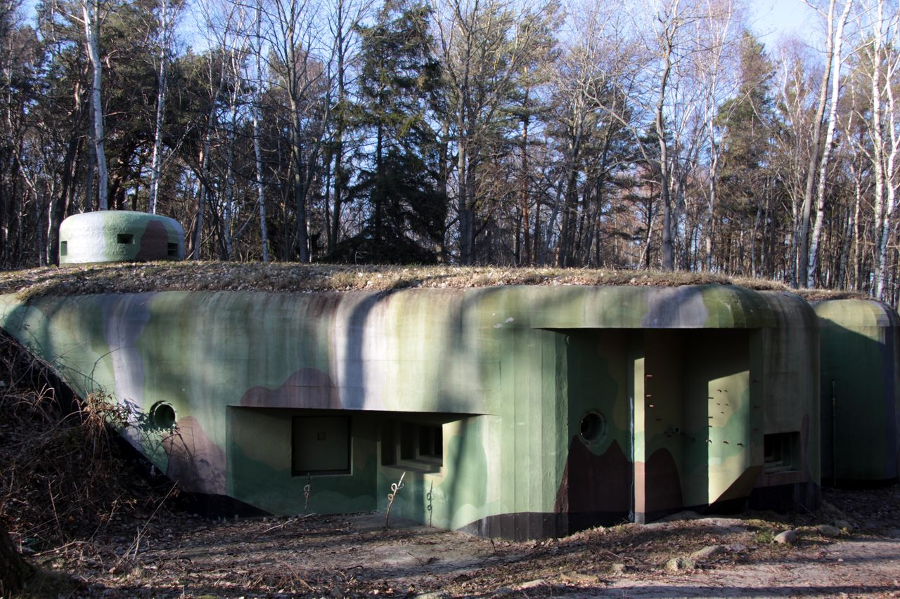 Jastarnia - schron bojowy Sabała, 1939